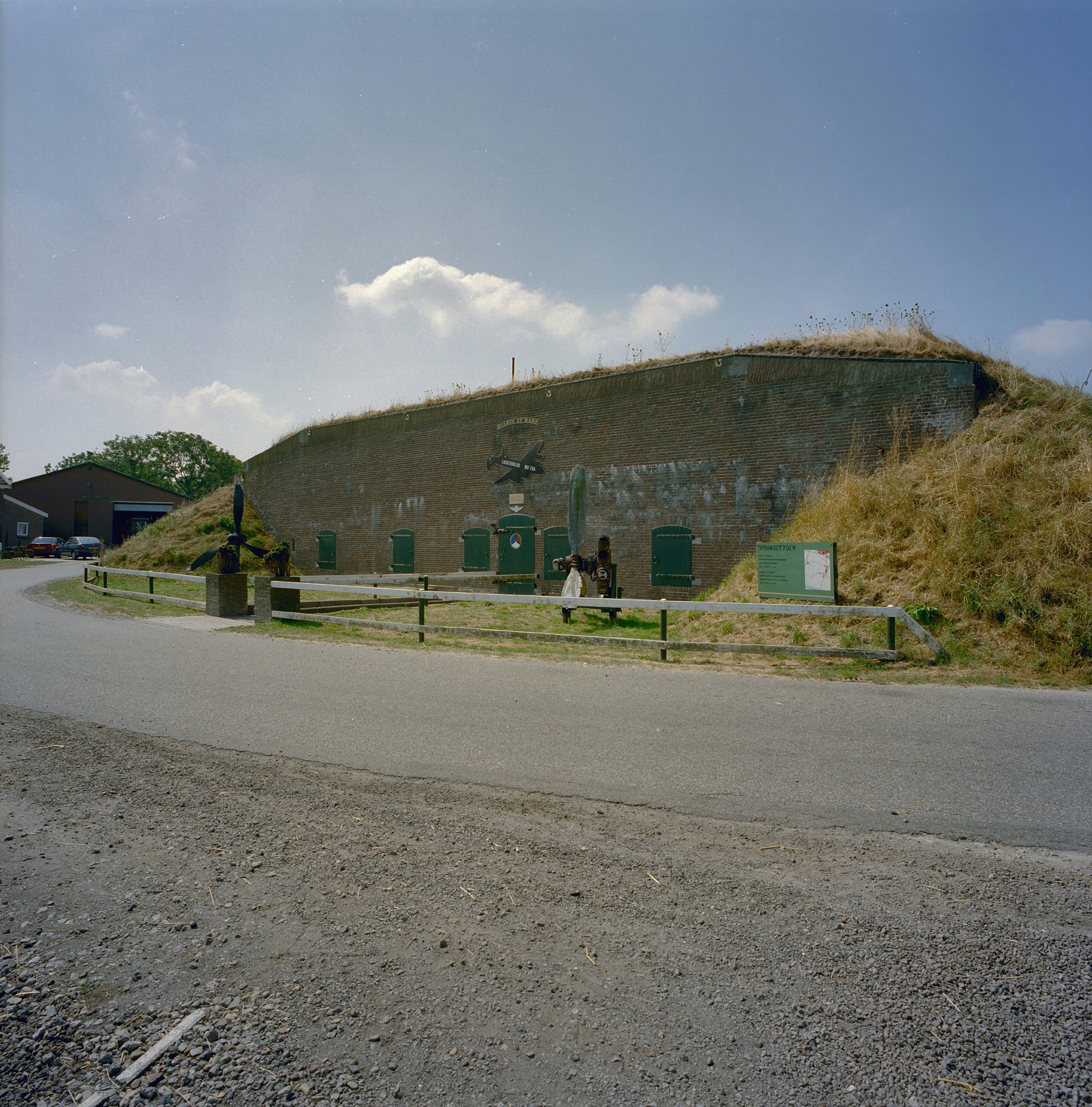 Kruitmagazijn bij de Stenen Paal: Kruitmagazijn tegen het binnentalud van de dijk met daarvoor de gemeenschapsweg